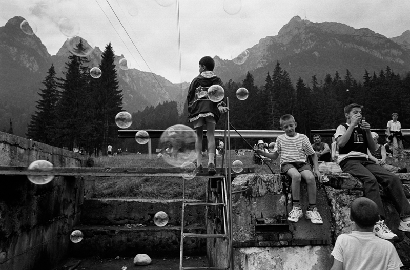 Bucsecs-hegység (Molnár Zoltán fotóművész képe), A kép címe: Bucsecs / Bucegi, Erdély 2001[1]